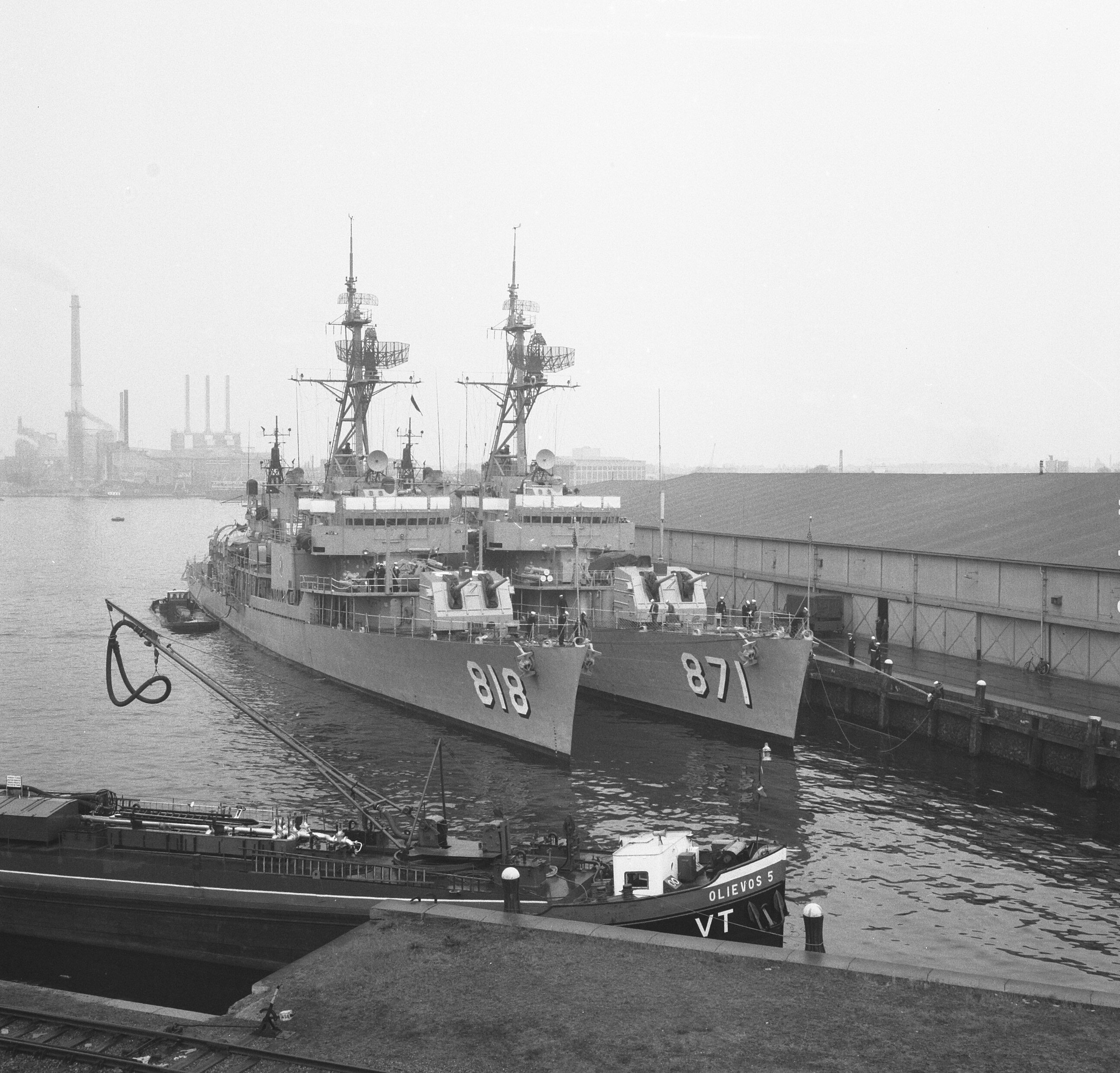 Collectie / Archief : Fotocollectie Anefo Reportage / Serie : [ onbekend ] Beschrijving : Amerikaans vlootbezoek in Amsterdam, de 2 jagers bij het "Stenen Hoofd" Datum : 18 juni 1964 Locatie : Amsterdam, Noord-Holland Trefwoorden : vlootbezoeken Fotograaf : Broers, F.N. / Anefo Auteursrechthebbende : Nationaal Archief Materiaalsoort : Negatief (zwart/wit) Nummer archiefinventaris : bekijk toegang 2.24.01.03 Bestanddeelnummer : 916-5532